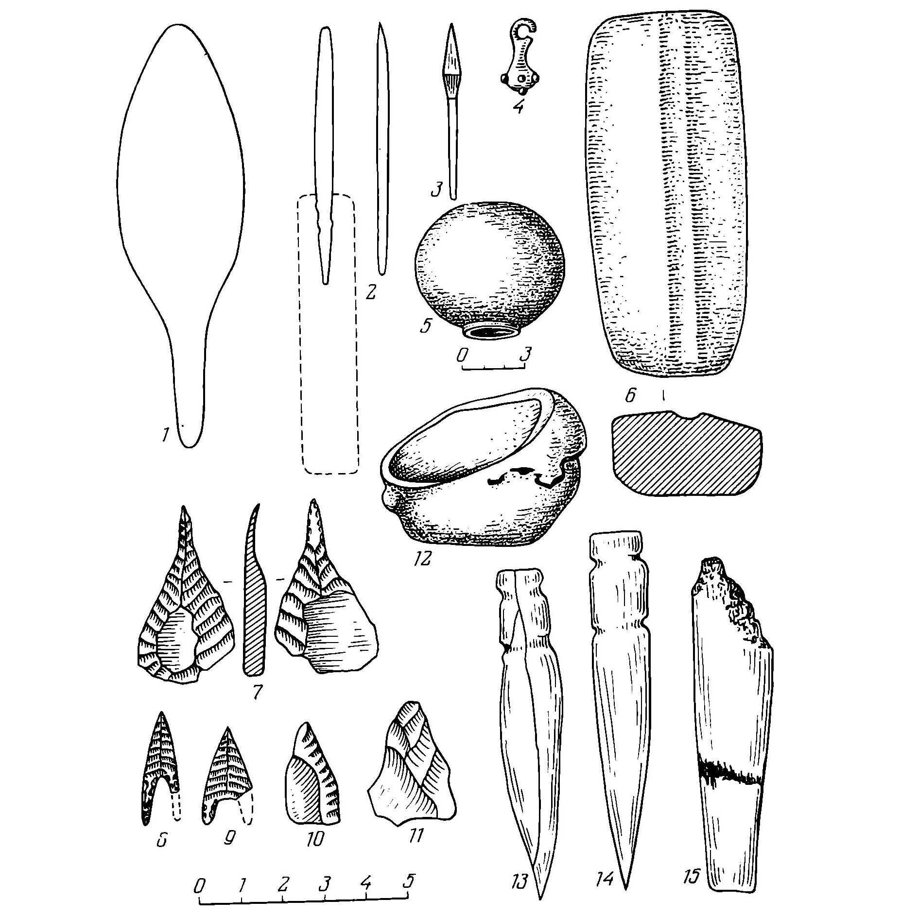 Предметы из бронзы: 1. кованый нож листовидной формы длиной 10 см; 2. стамесочка прямоугольного сечения; 3. шило; 4. булавовидная подвеска (женское украшение). Предметы из камня: 5. мраморная полированная булава; 6. "выпрямитель" стрел из красного песчаника; 7. проколка; 8 и 9. наконечники стрел; 10 и 11. кремневые отщепы-заготовки; 12. предмет из сферосидерита, полый. Костяные предметы: 13 и 14. плоские острия; 15. круглая в сечении костяная палочка конической формы.